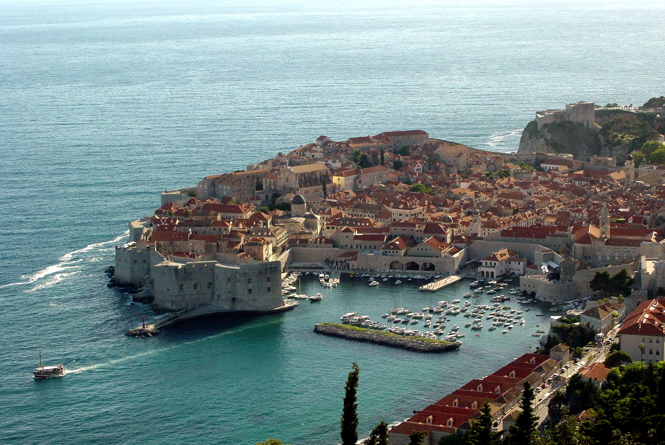 Altstadt von Dubrovnik (Kroatien)